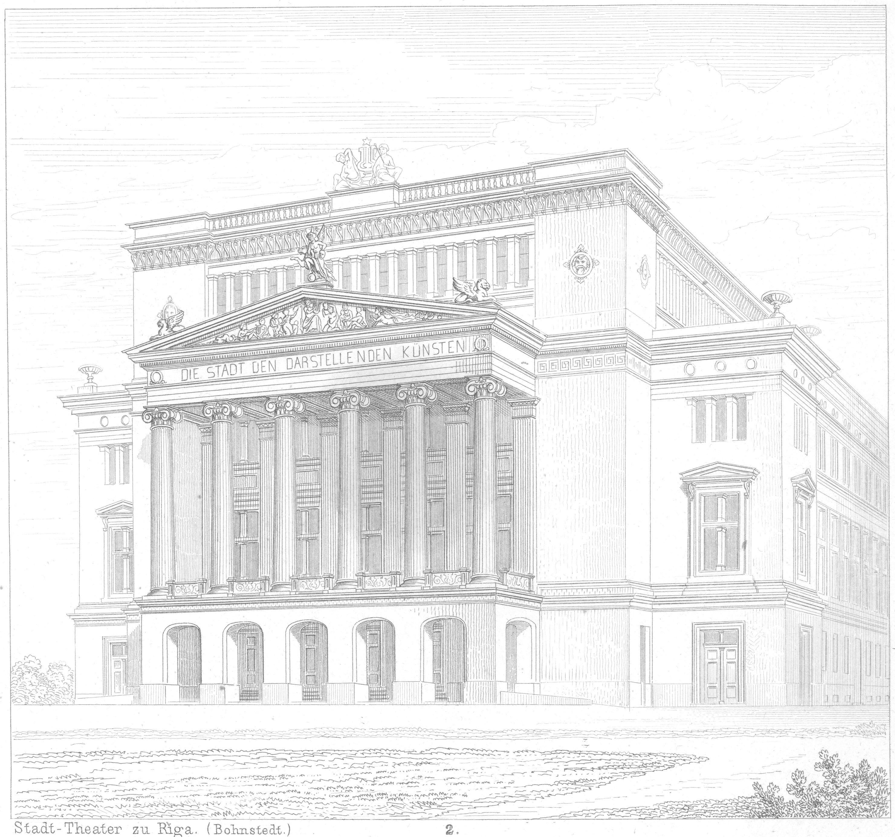 Stadt-Theater zu Riga, Architekt: Ludwig Bohnstedt)